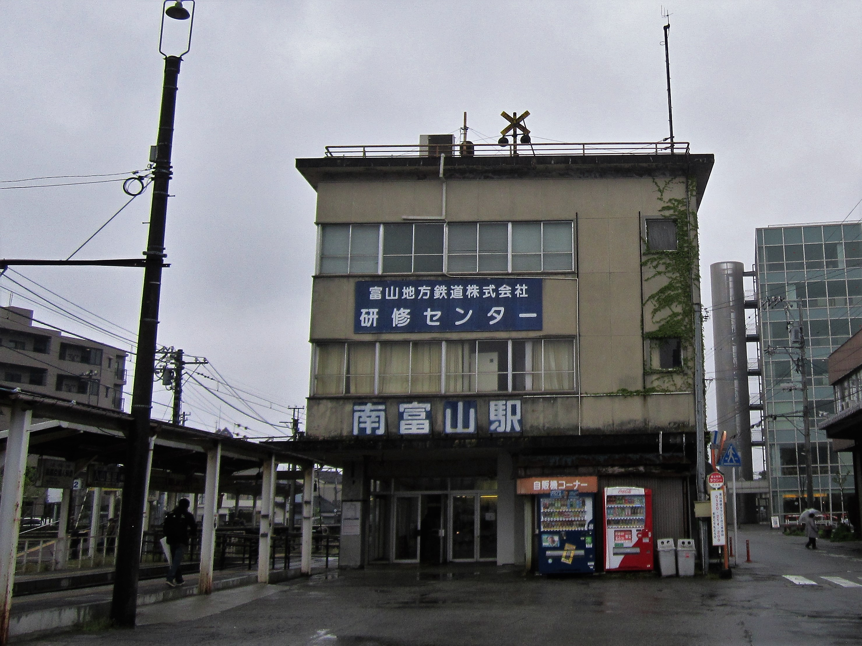 富山地方鉄道 南富山駅 Canon PowerShot A2200